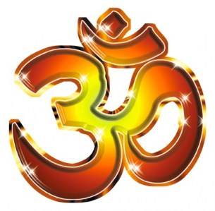 simbolo do sphota